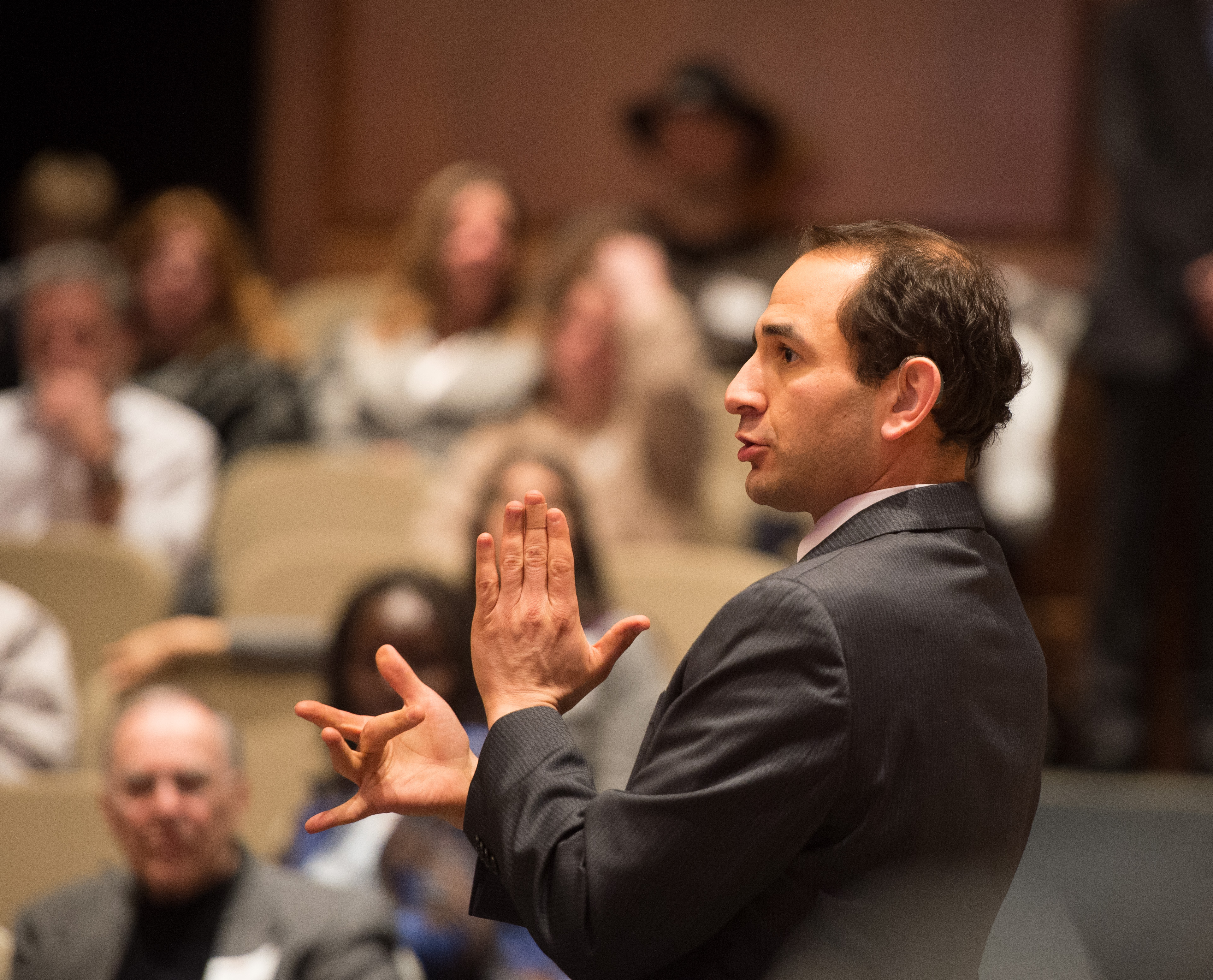 Gebrauch von Lautsprachunterstützenden Gebärden zusätzlich zur Lautsprache (hier im Amerikanischen Englisch beim „Deaf and Hard of Hearing Awareness Day“ 2013 in Annapolis in Maryland, USA).